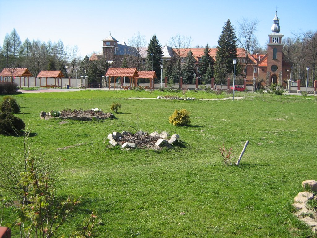 Stadniki (województwo małopolskie) - Wyższe Seminarium Misyjne Księży Sercanów w Stadnikach .